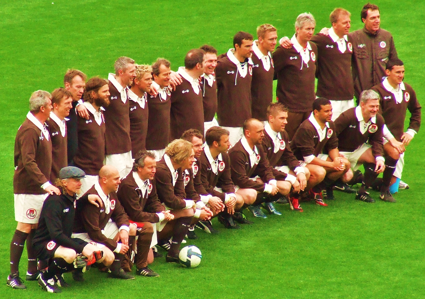 Traditionsmannschaft 2010 des FC St. Pauli, vor dem Match gegen den FC United of Manchester.Stehend v.l.n.r.: Dietmar Demuth, Jens-Peter Box, Klaus Thomforde, Benjamin Adrion, Dirk Dammann, Martin Driller, Rudolf Sturz, Jürgen Gronau, Michael Dahms, Christian Springer, Christian Rahn, Ján Kocian, André Trulsen, Helmut SchulteHockend v.l.n.r.: Volker Ippig, André Golke, Hansi Bargfrede, Klaus Ottens, Dirk Zander, Bernd Hollerbach, Peter Knäbel, Holger Stanislawski, Ivan Klasnić, Michél Mazingu-Dinzey, Ralf Sievers, Ralph Gunesch